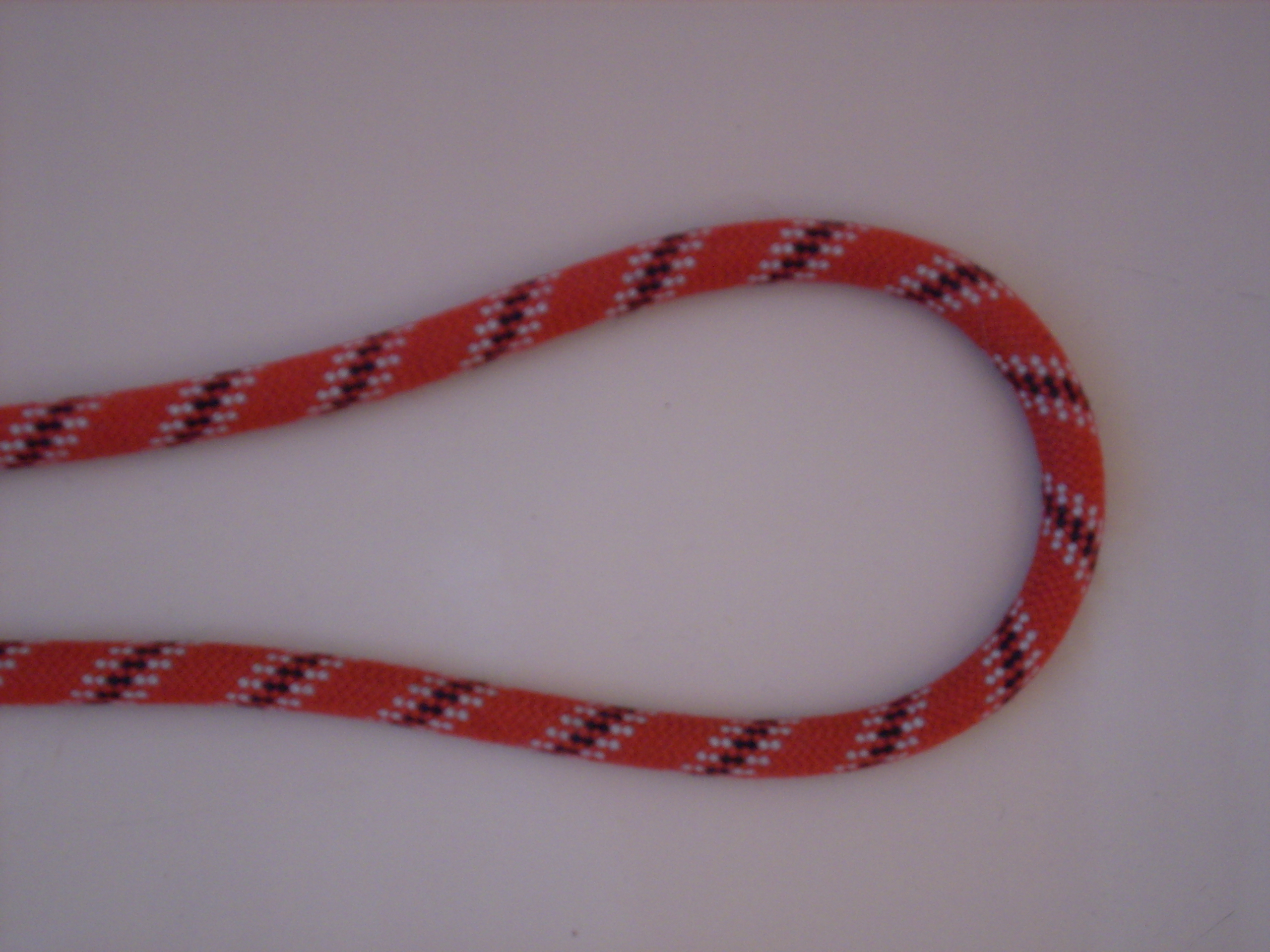 Schlaufe. Bucht.